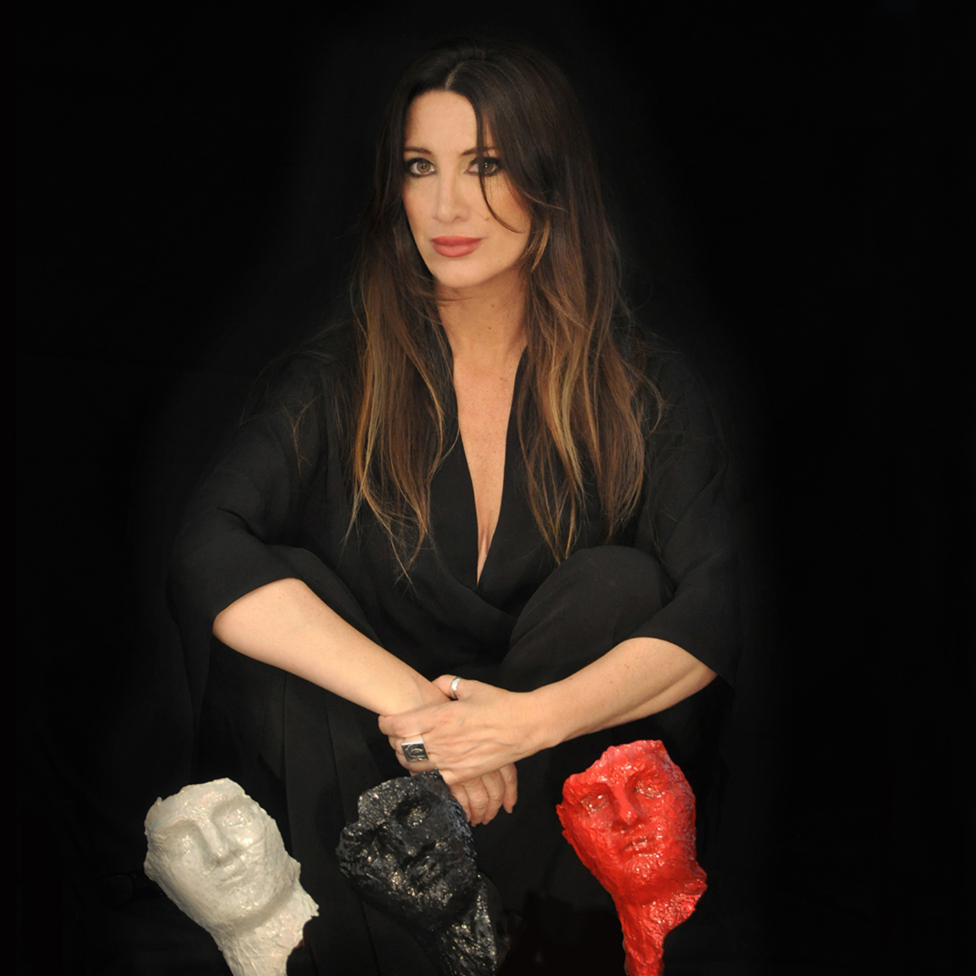 Elena Re Depaolini, in arte Elena Rede, (Legnano 18.11.1967), è una scultrice e pittrice italiana contemporanea.